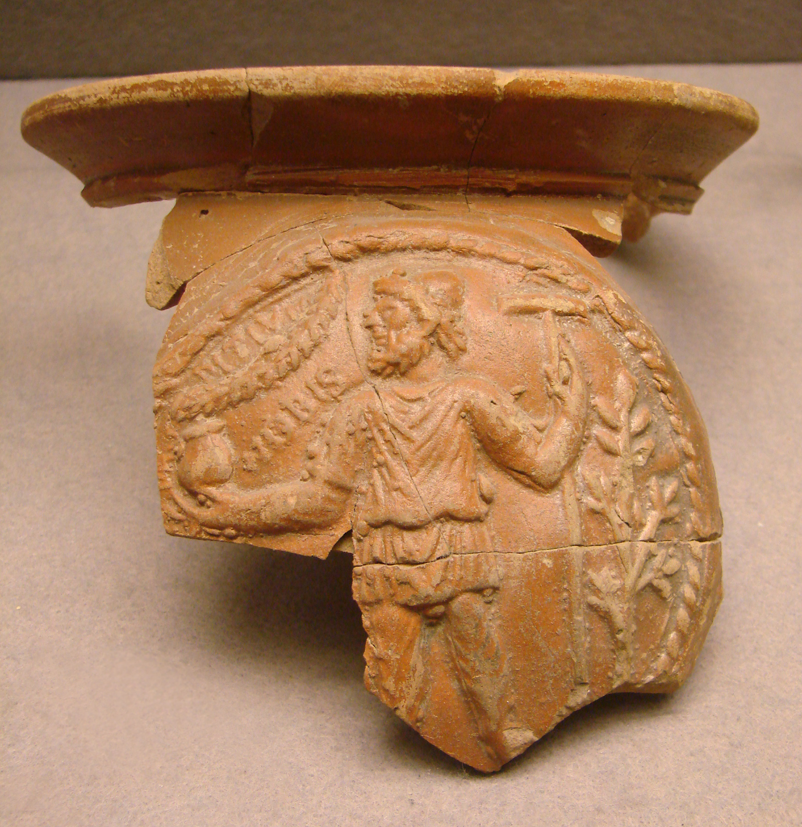 Médaillon d'applique représentant le dieu Sucellus, tenant un pot et un maillet.Premier quart du 3ème s. + JC, Amiens.Musée de Picardie à Amiens.